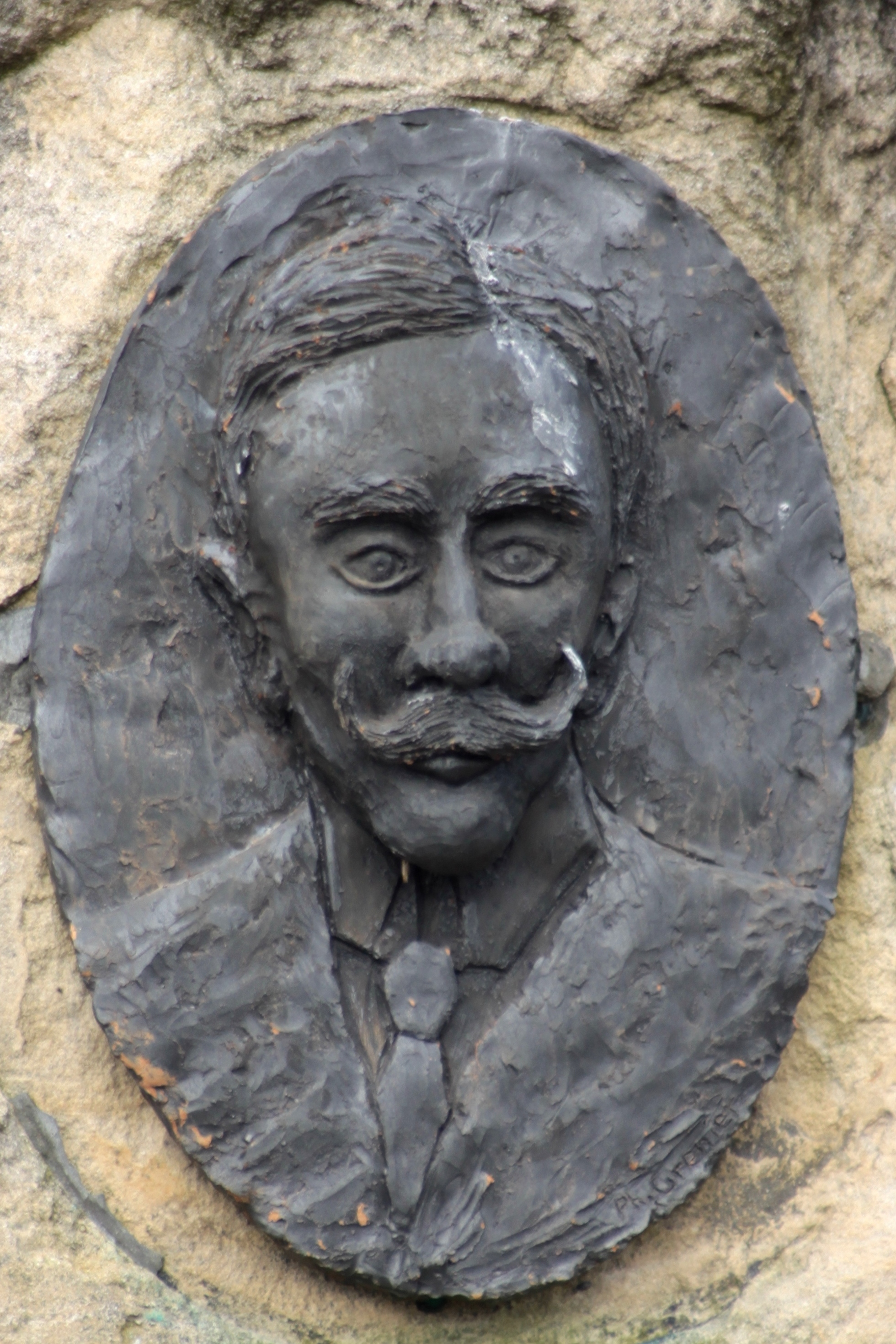 Portrait de Henri Béconnais. Détail du Monument installé au lieu de son accident mortel près de Labouheyre dans les Landes